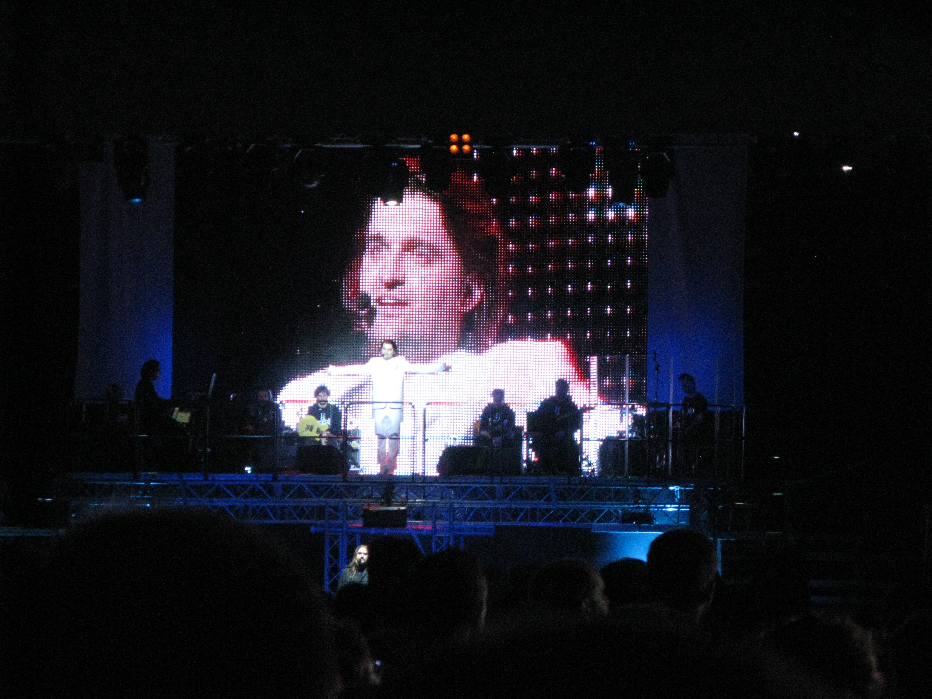 Marcin Kołaczkowski jako Kuno von Lichtenstein w przedstawieniu rock opery Krzyżacy w Fosie Zamkowej w Toruniu